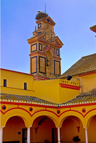 Convento de S. Francisco, sede del Archivo Histórico Municipal de Moguer (Huelva)